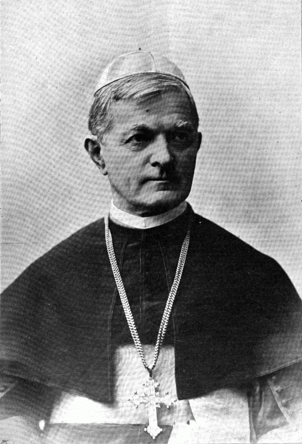 Juraj Posilović (1834-1914), Croatian bishop